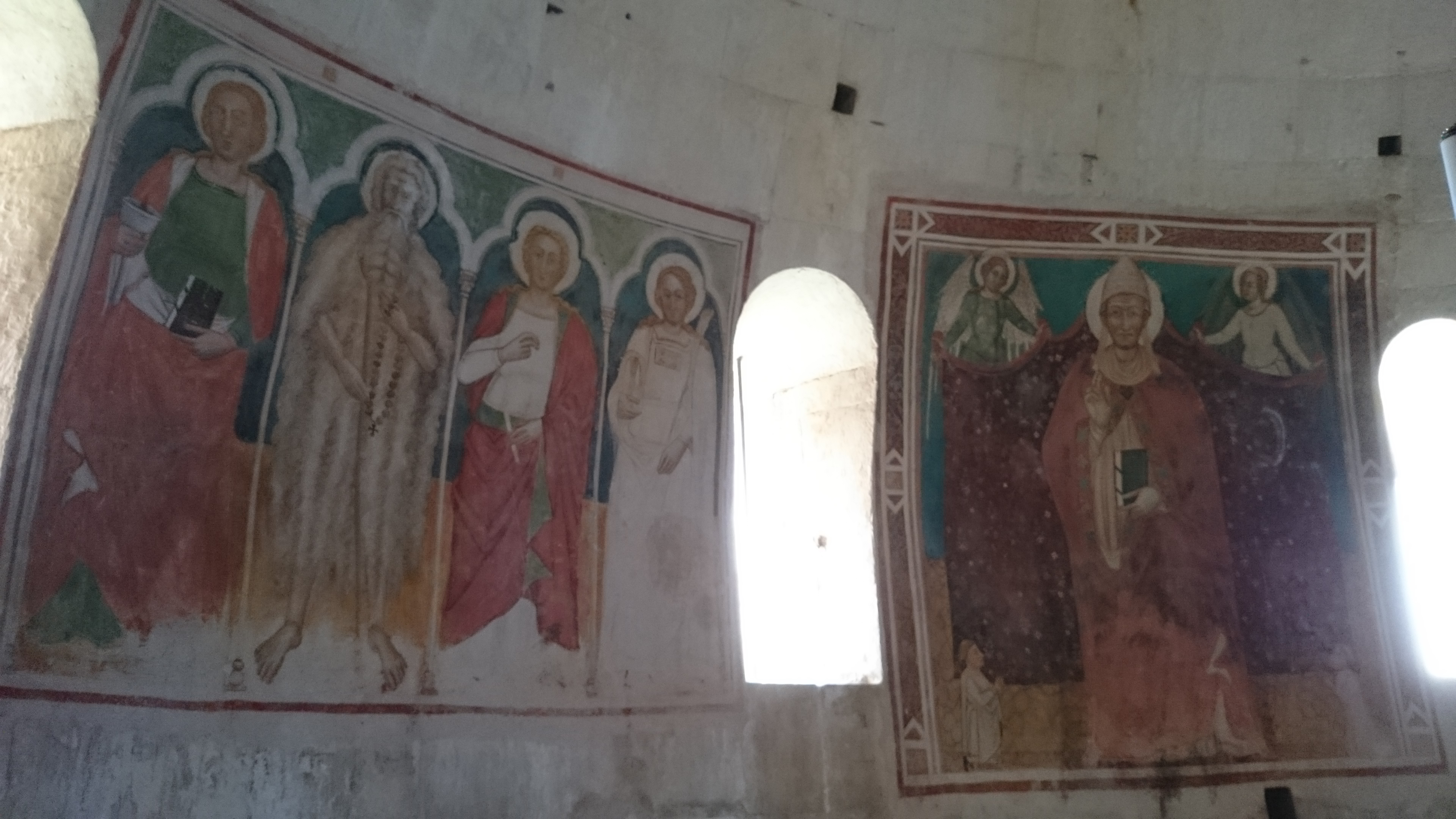 Corfinio (AQ): Basilica concattedrale valvense di San Pelino